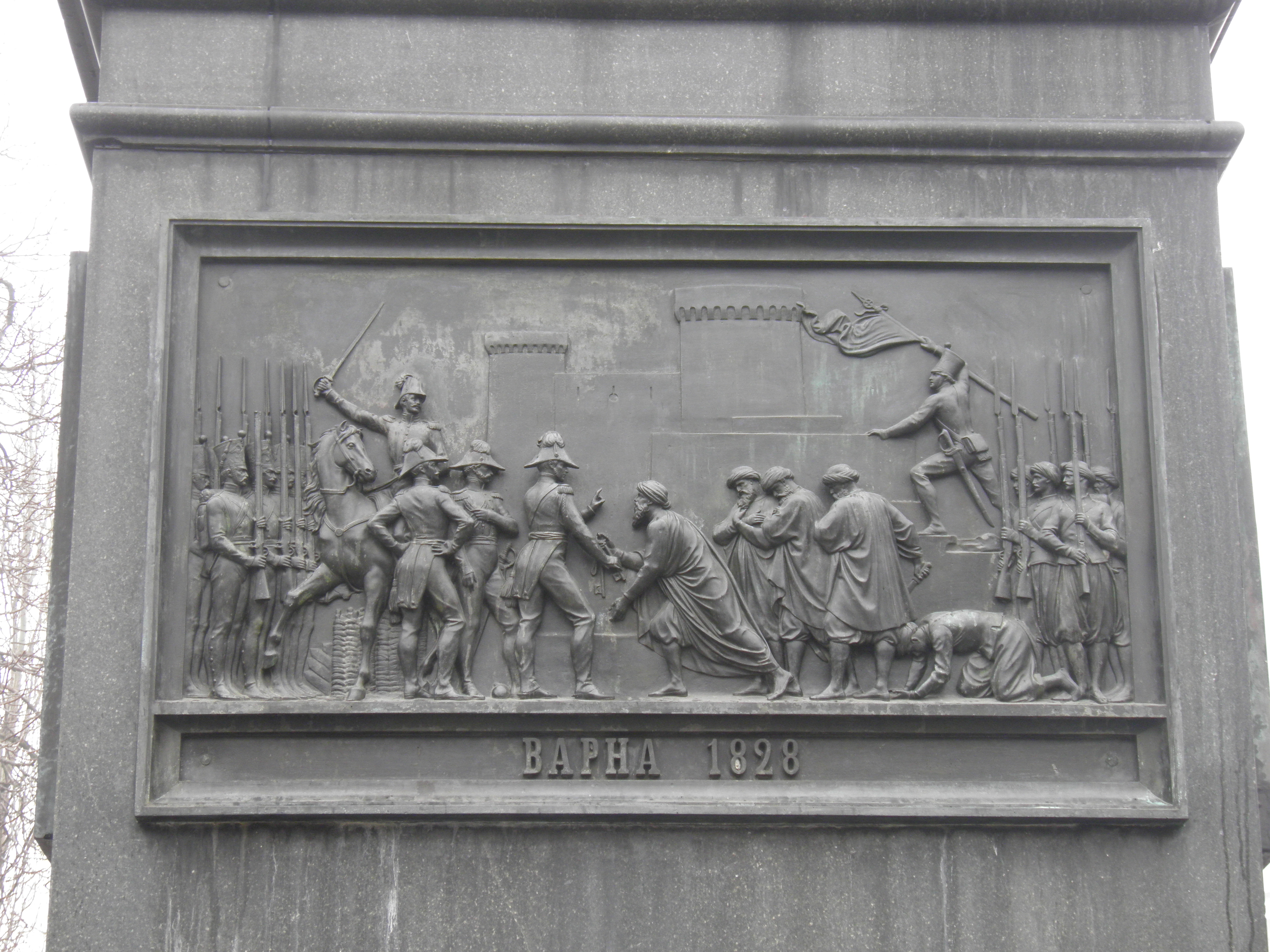 Пам'ятник М.С. Воронцову – князю, генерал-губернатору Новоросійського краю, герою Вітчизняної війни 1812 р., Одеса, Соборна пл.